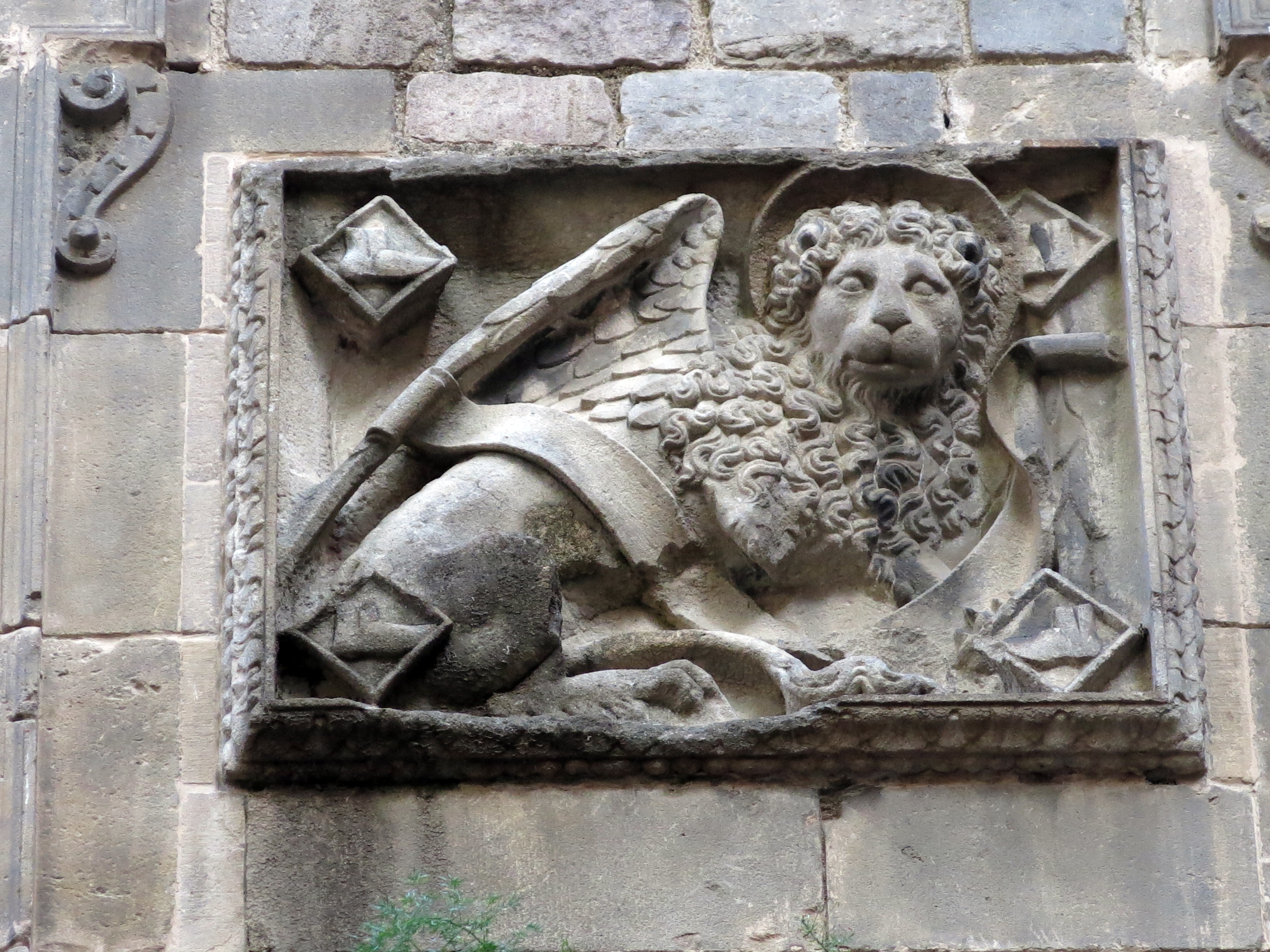 Casa del Gremi dels Sabaters (Barcelona)